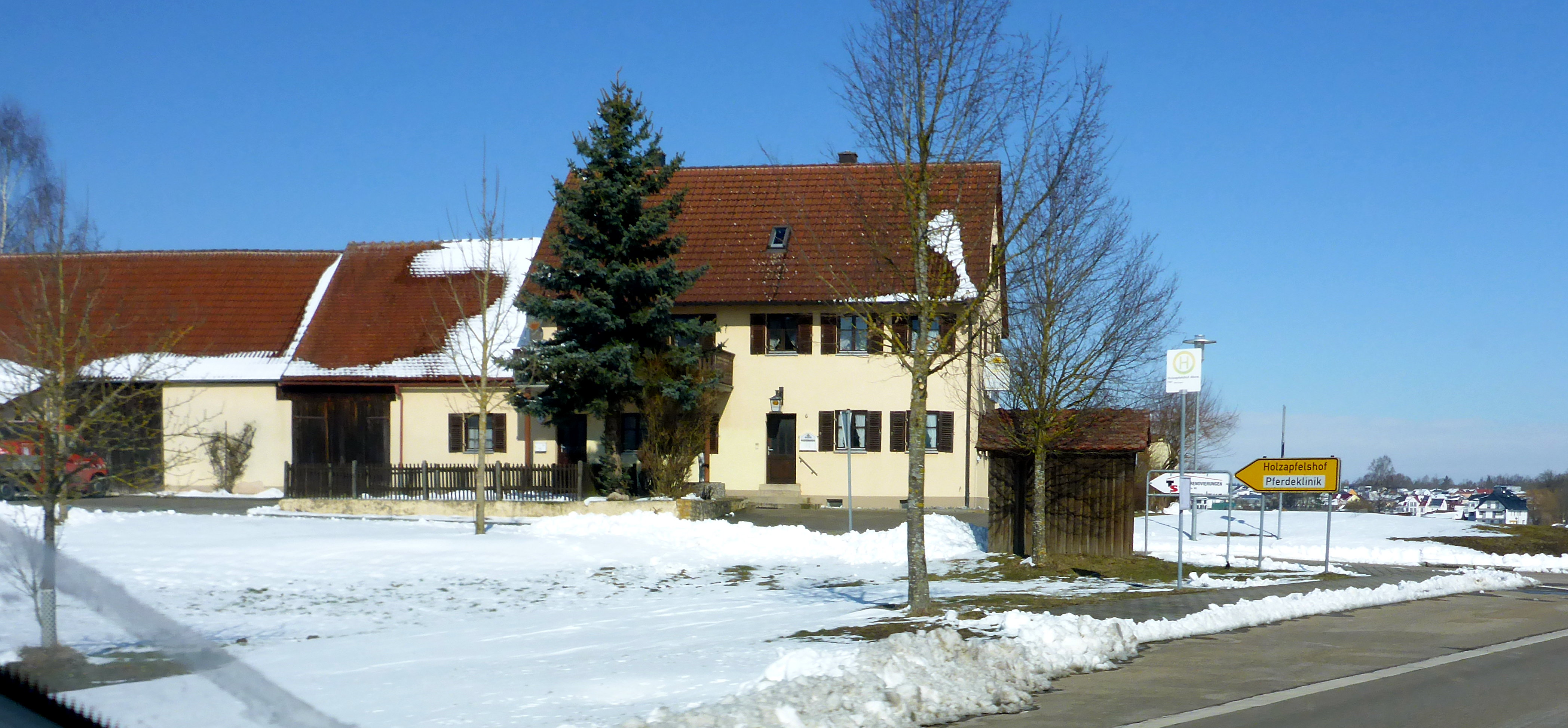 Holzapfelshof, Bushaltestelle